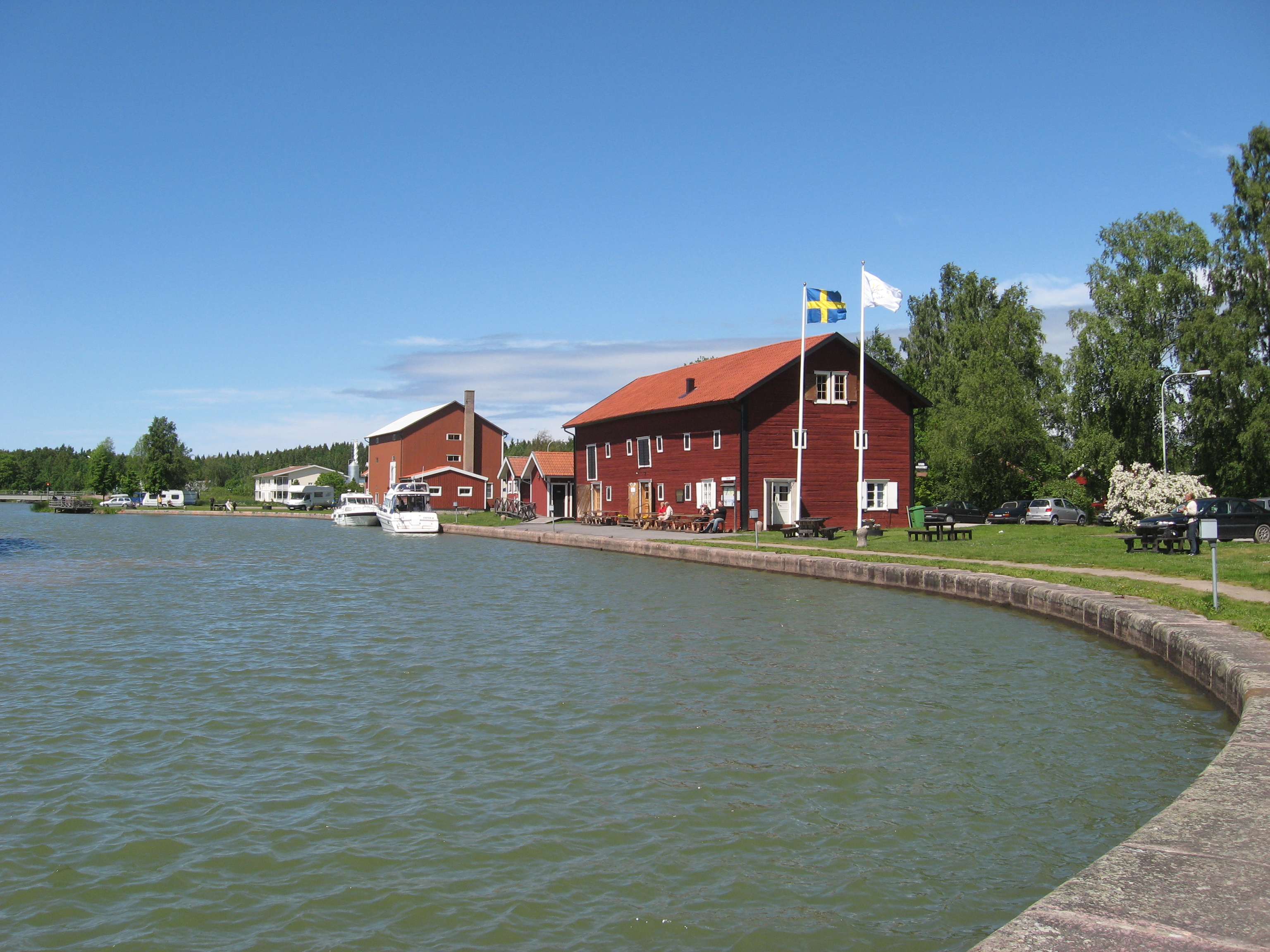 Hamnmagasinet i Lyrestad